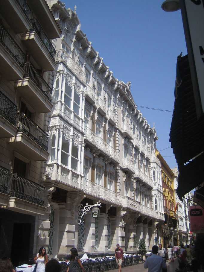 Casa Cervantes de Cartagena. Obra modernista de Víctor Beltrí.